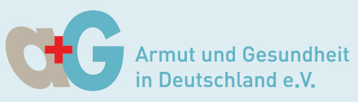 Logo des gemeinnützigen Vereins Armut und Gesundheit in Deutschland e. V.